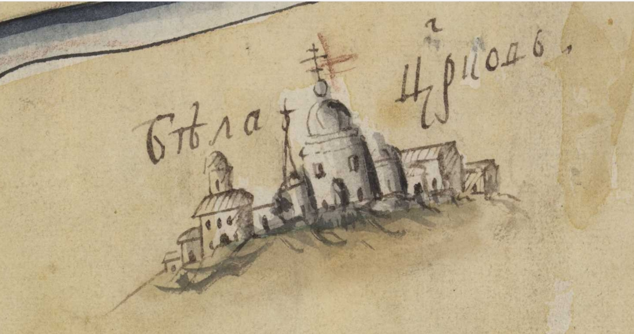 Фрагмент карти Київської губернії. XVIII століття. РГАДА, ф. 192, оп. 1, Киевская губ., № 5.